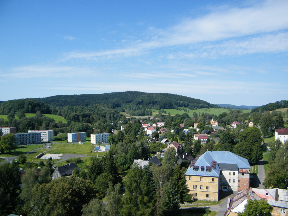 Pohled z věže kostela svatého Mikuláše v Mikulášovicích